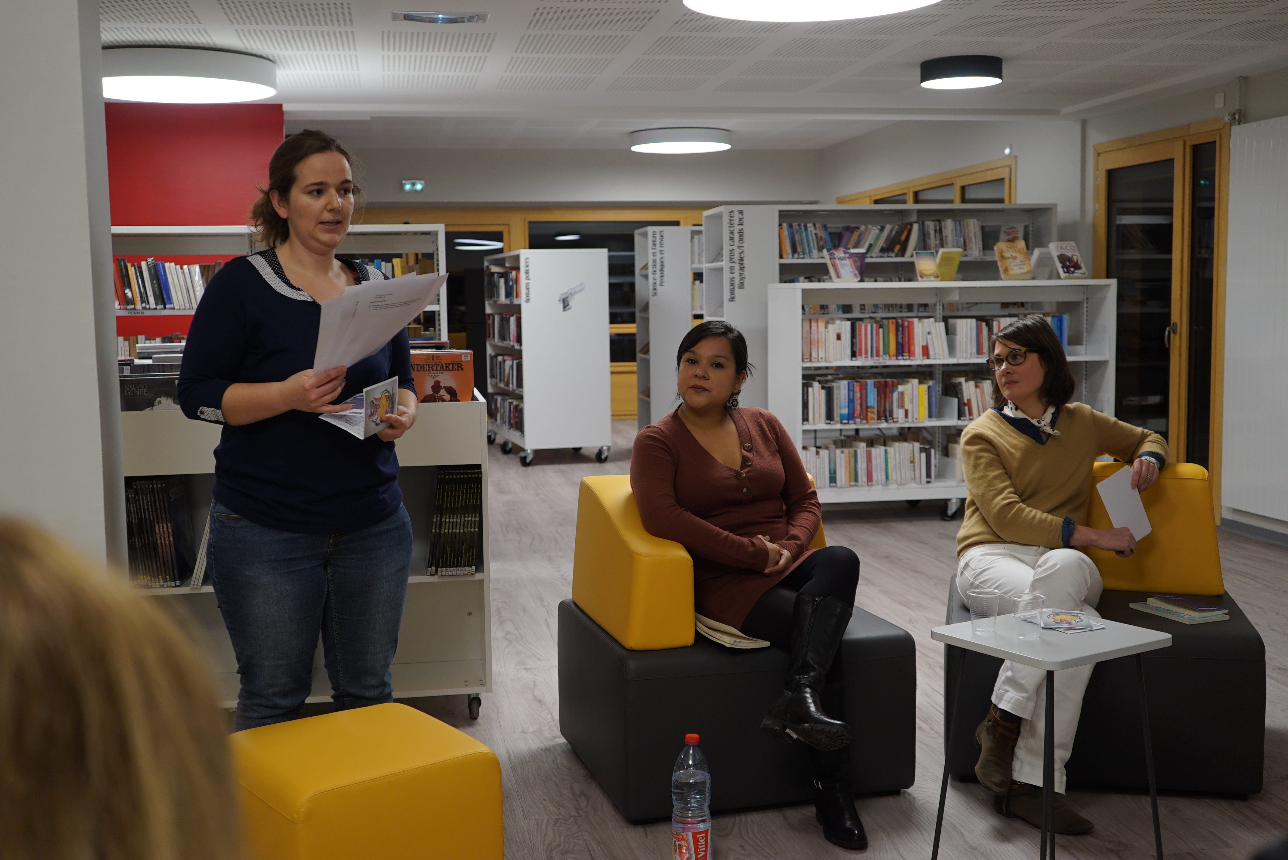 en conférence dédicace à la bibliothèque de Saint-Brice-Courcelles.